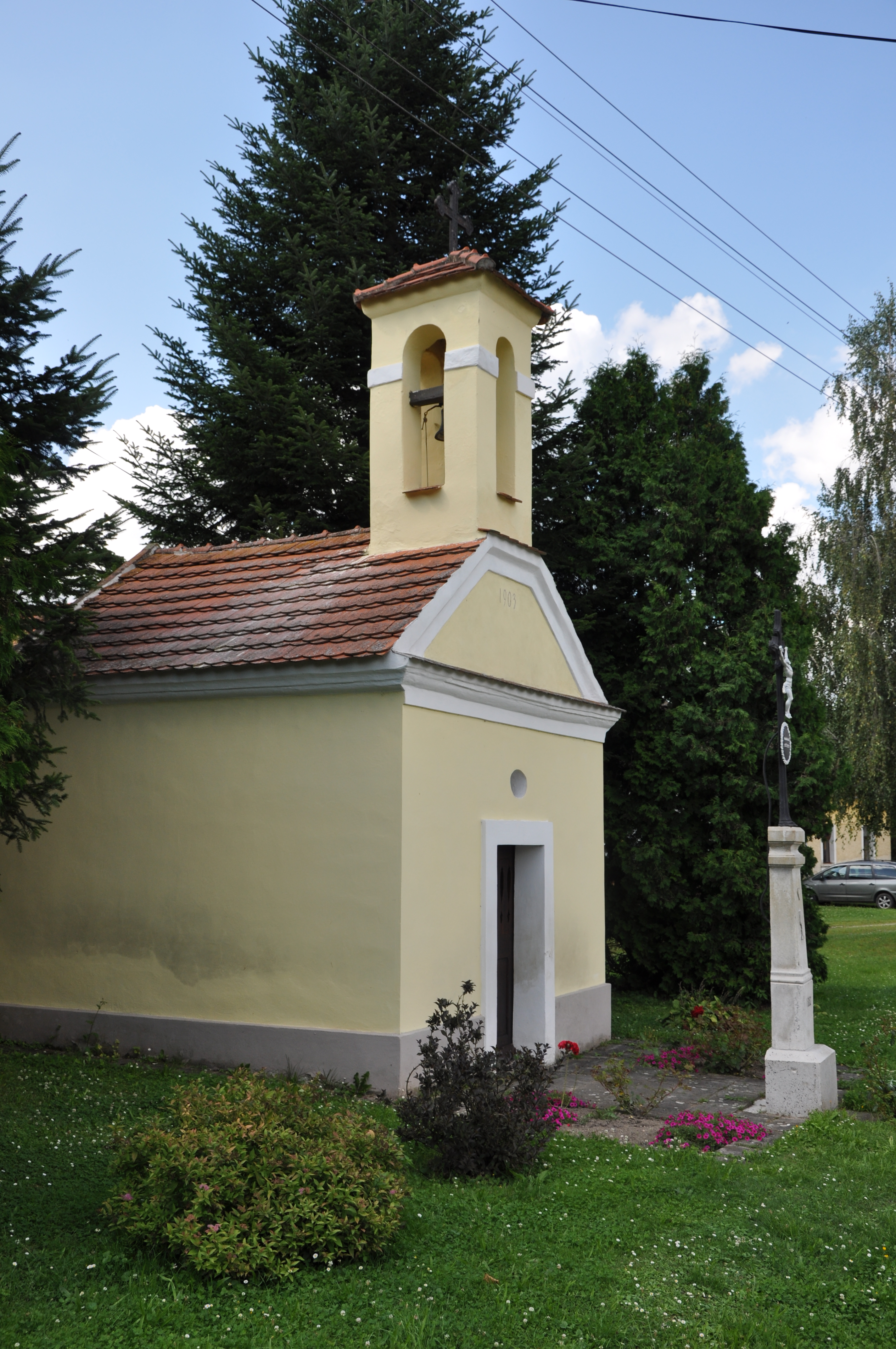 Kaple na návsi v obci je zasvěcená svatému Janu Nepomuckému. Lhota u Kestřan je malá vesnice, část obce Kestřany v okrese Písek. Česká republika.